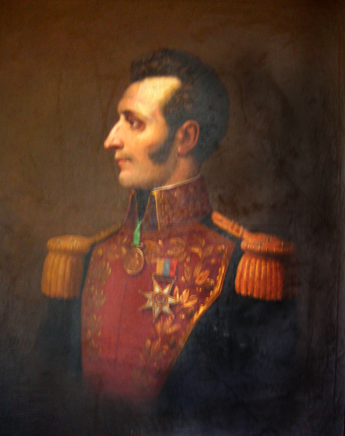 Photo by Yosemite. Place:Museo Casa de Scure in Quito Ecuador.